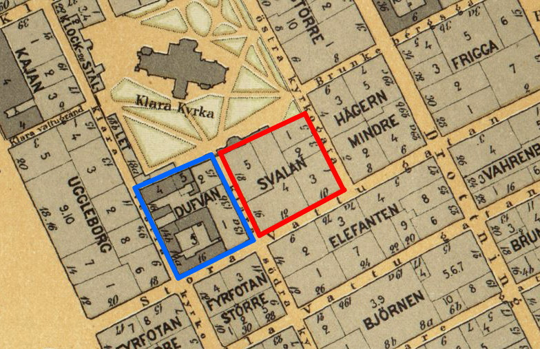 Del av Stockholmskarta visande kvarteret Svalan på Norrmalm